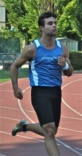 Michael Tumi durante una gara a Vicenza, licenza libera